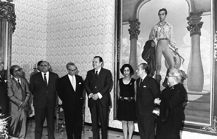 Rafael Caldera y Pedro Centeno Vallenilla en la inauguración de Bolívar agricultor en Residencia Presidencial La Casona.